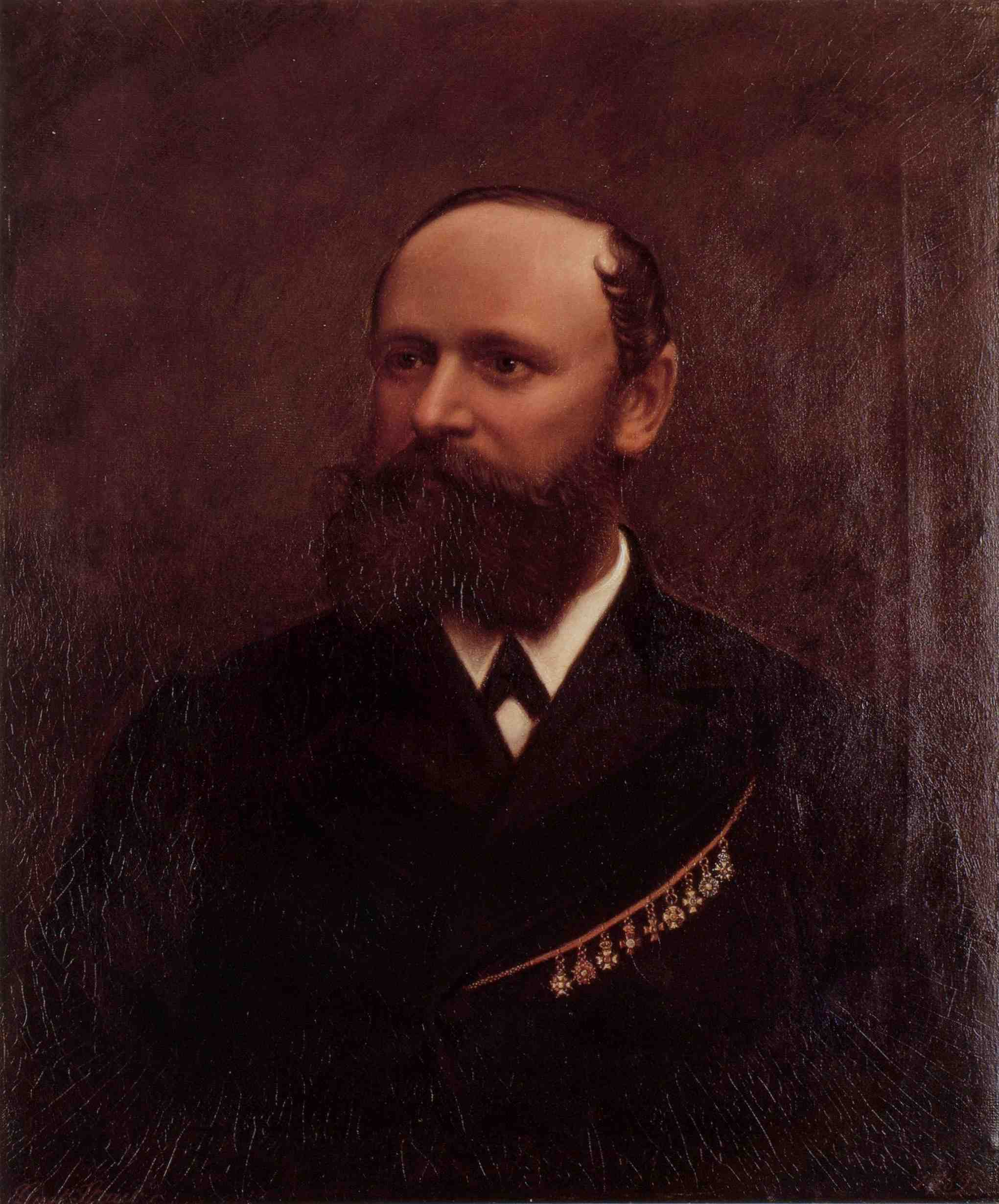 Arnold Staub mit Ordenskette. Ölporträt seines verstorbenen Bruders von Gustav Staub nach einem Foto, 1889.